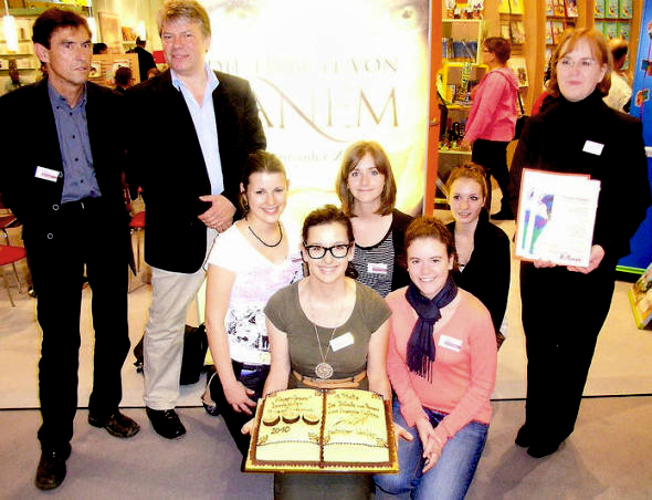 Leseclubmitglieder überreichen Peter Klöss (2. v.l.), Übersetzer von "Tribute von Panem", den 1. Preis: einen riesigen Kuchen in Buchform